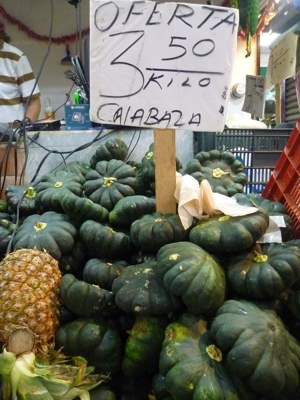 Cucurbita Moschata en un mercado de la Península de Yucatán.